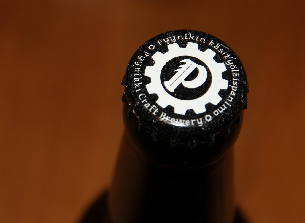 Pyynikin käsityöläispanimo Oy on vuonna 2012 perustettu Tampereen Raholan kaupunginosassa toimiva pienpanimo.